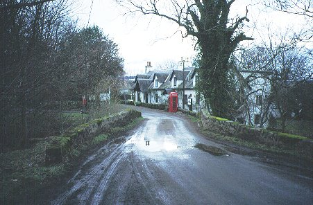 Ardeonaig